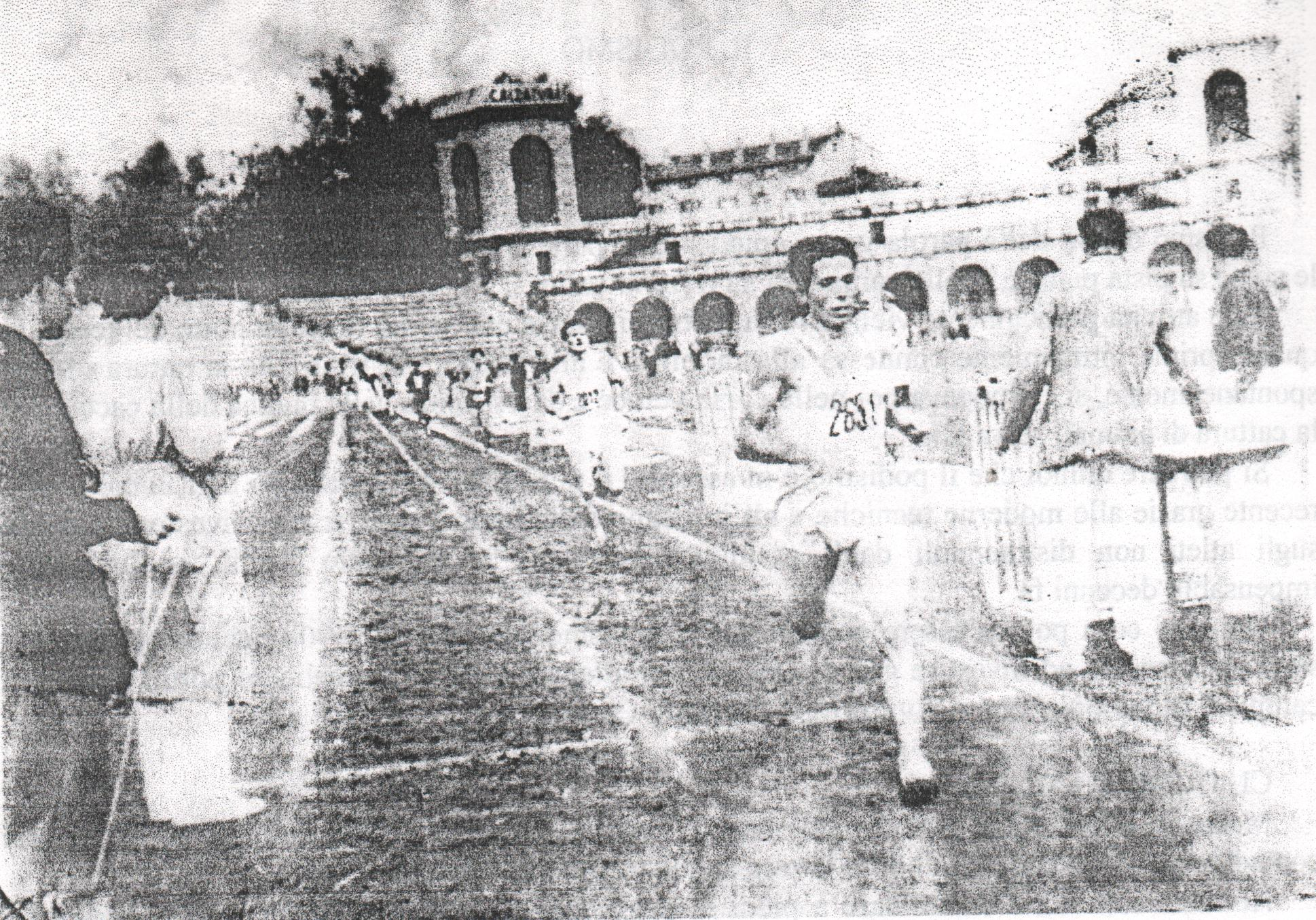 Giovanni Cultrone all'Arena di Milano